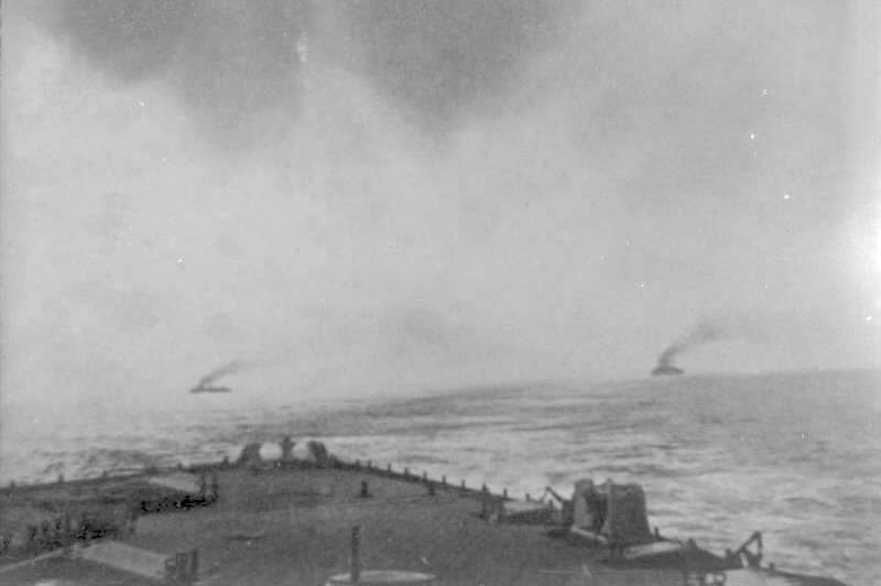 Verfolgung deutscher Kreuzer durch britische Marine Britische Marine 1. Weltkrieg Englische Seestreitkräfte verfolgen SMS "Goeben" und "Breslau"